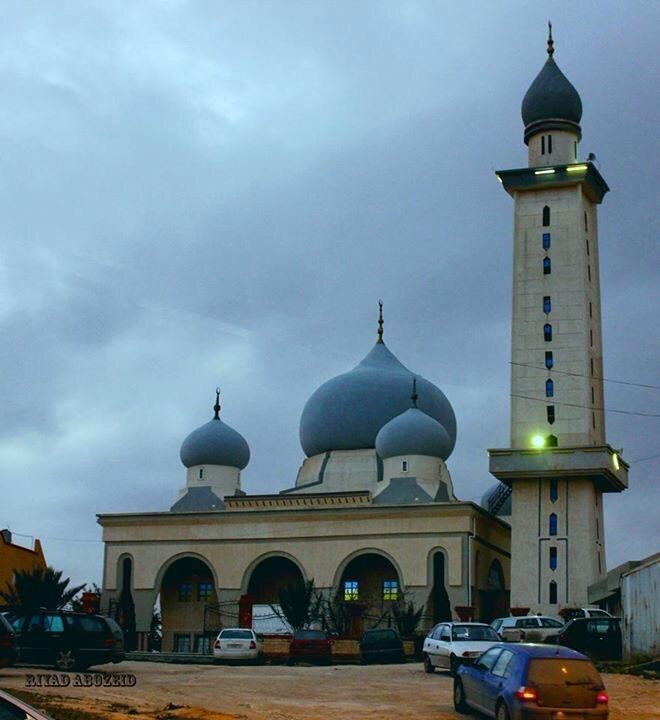 مسجد ابوزيان